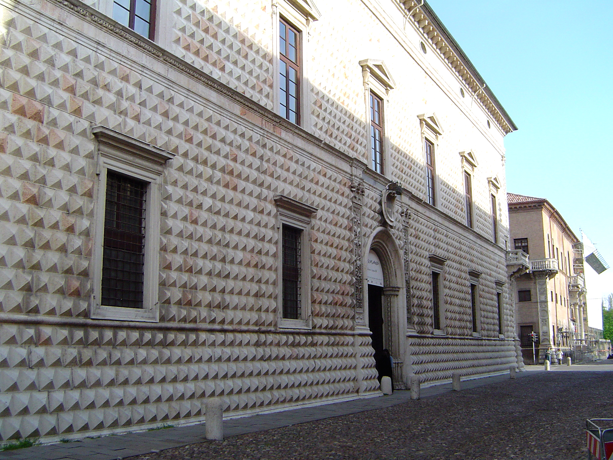 Palazzo dei Diamanti, Ferrara.